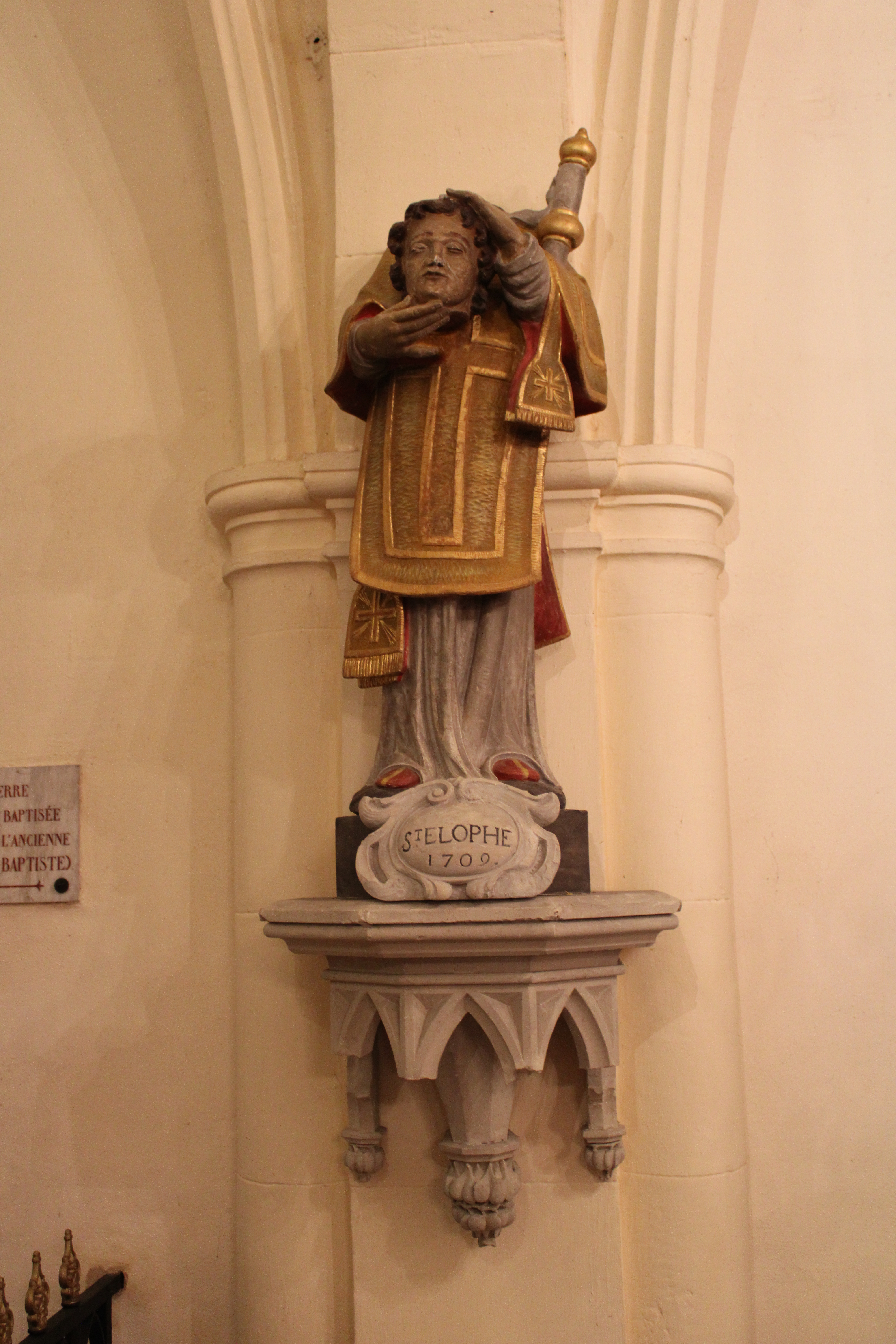 Statue de St-Elophe